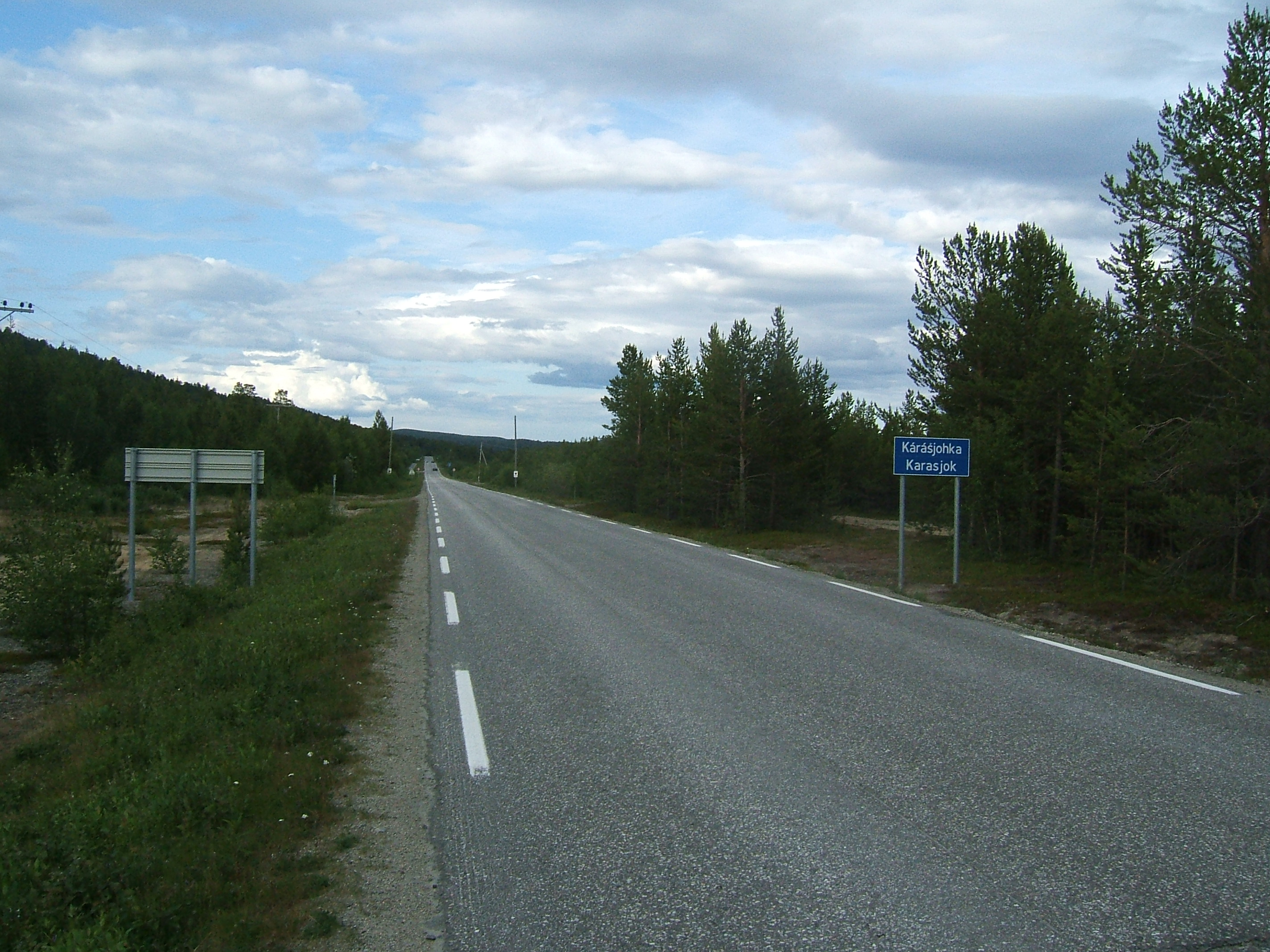 Riksvei 92 near Karasjok, Norway. Original description: Entering Kárášjokha